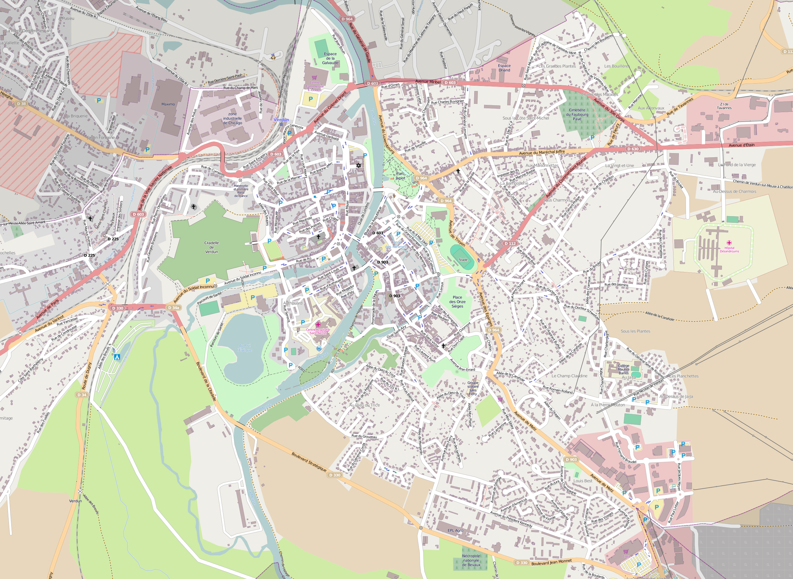 Plan de la partie urbanisée de la commune de Verdun (55100) avec OpenStreetMap.